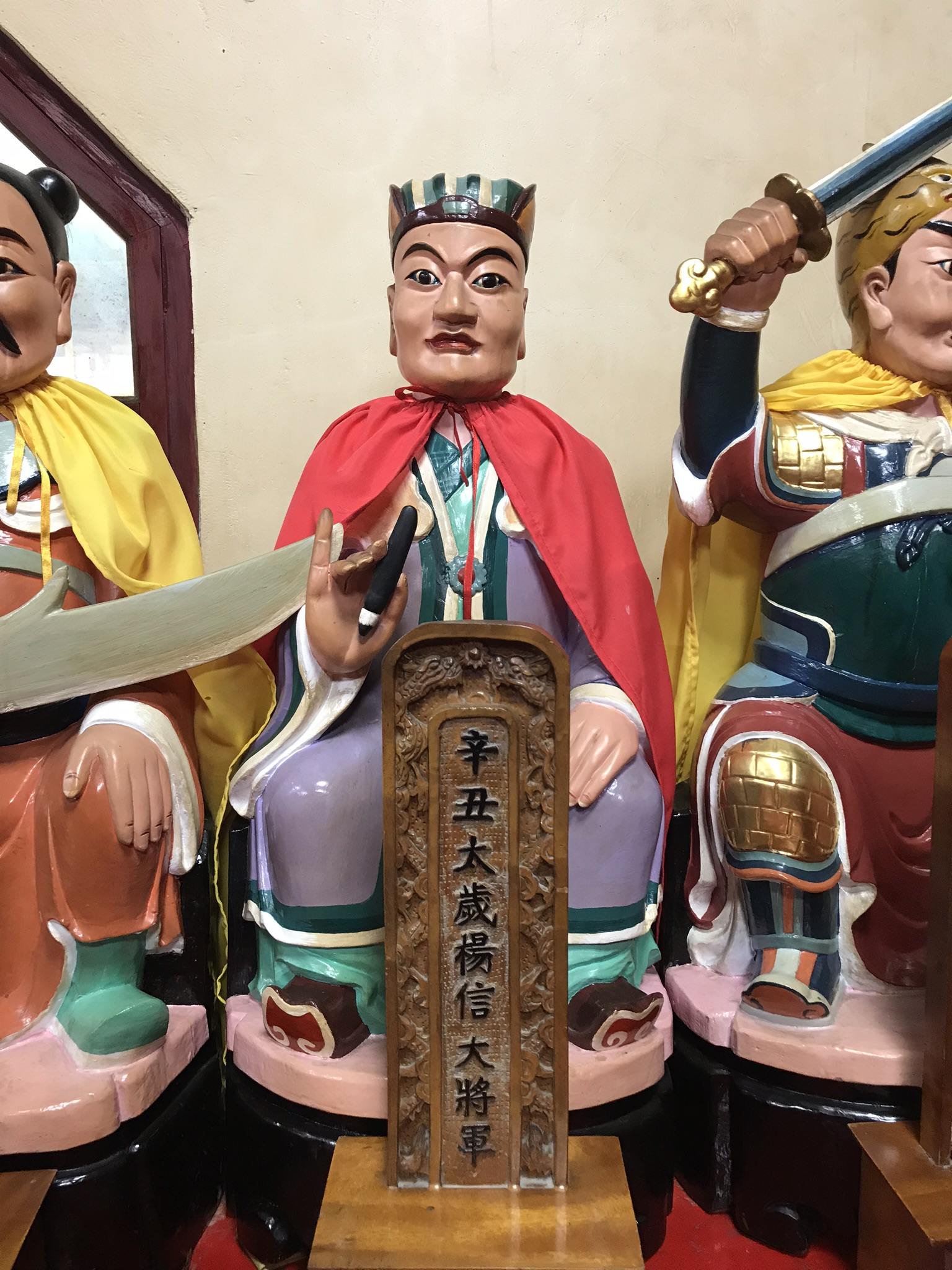 辛丑太歲楊信大將軍神像